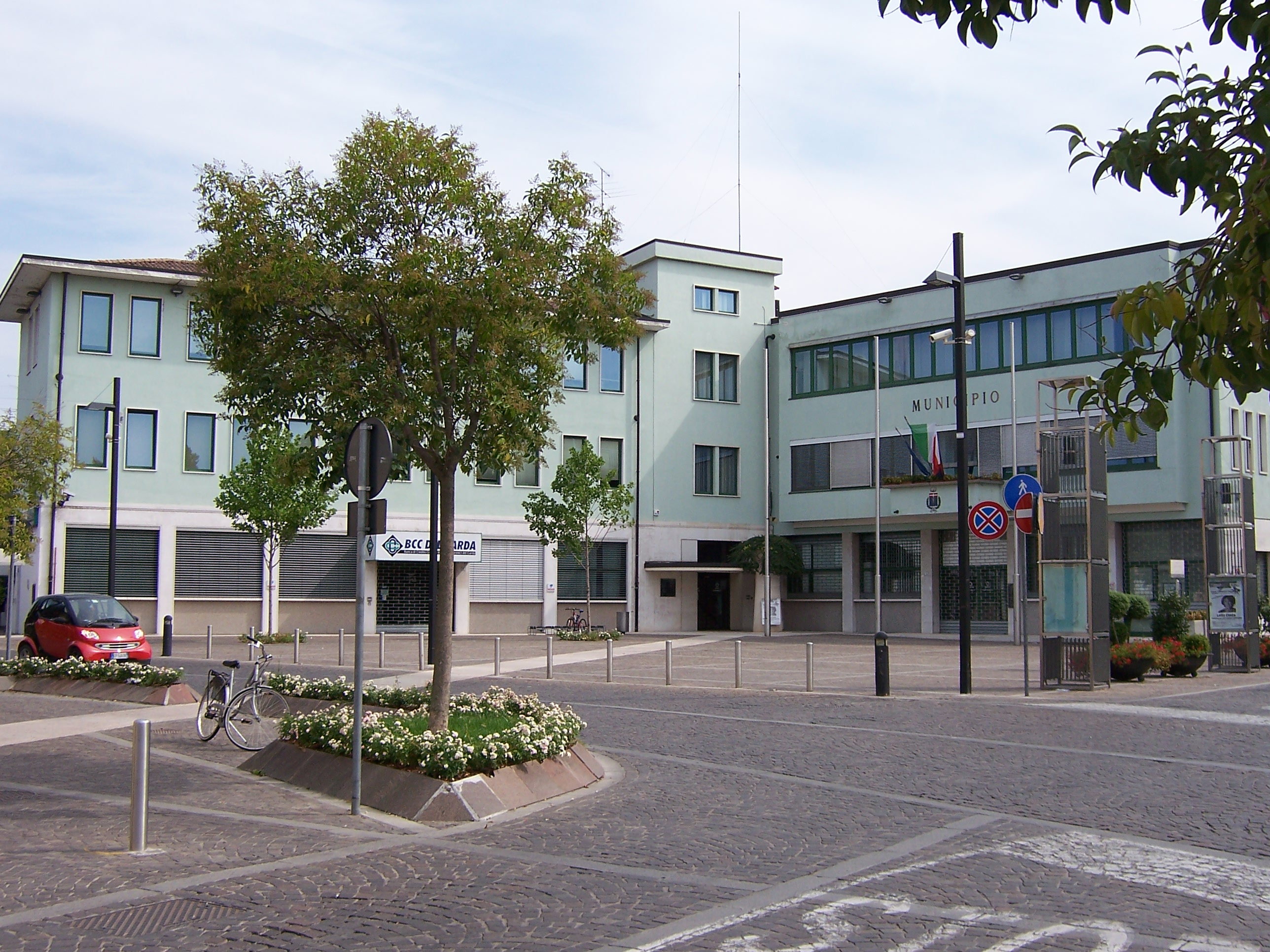 Il comune di Calcinato